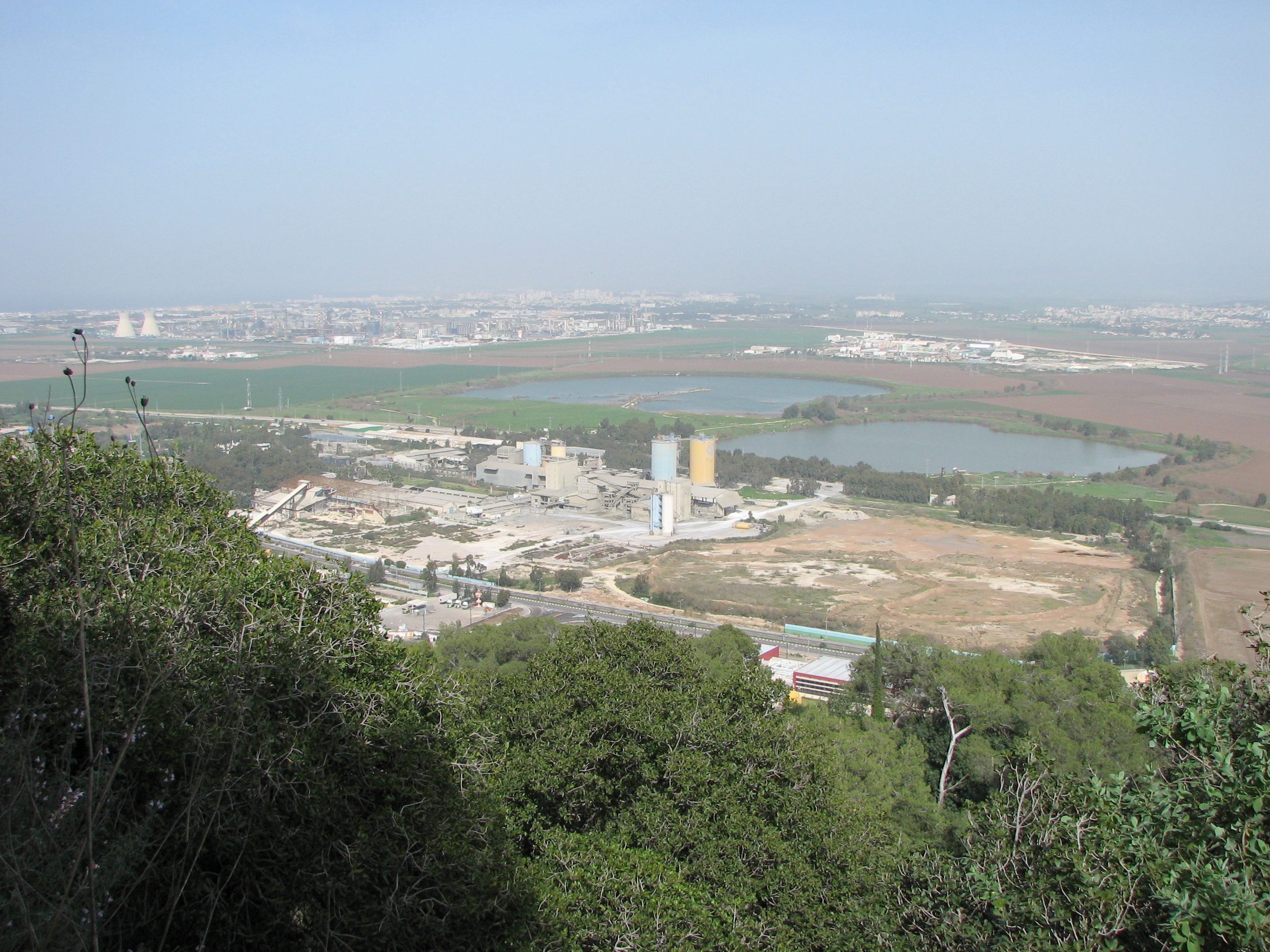 Green Paths, between Nesher - Yagur on Mount Carmel Israel. View from the path השביל הירוק בין העיר נשר וקיבוץ יגור, על הצלע הצפונית של הר הכרמל. מראות על השביל בית חרושת נשר מפעלי מלט ישראליים